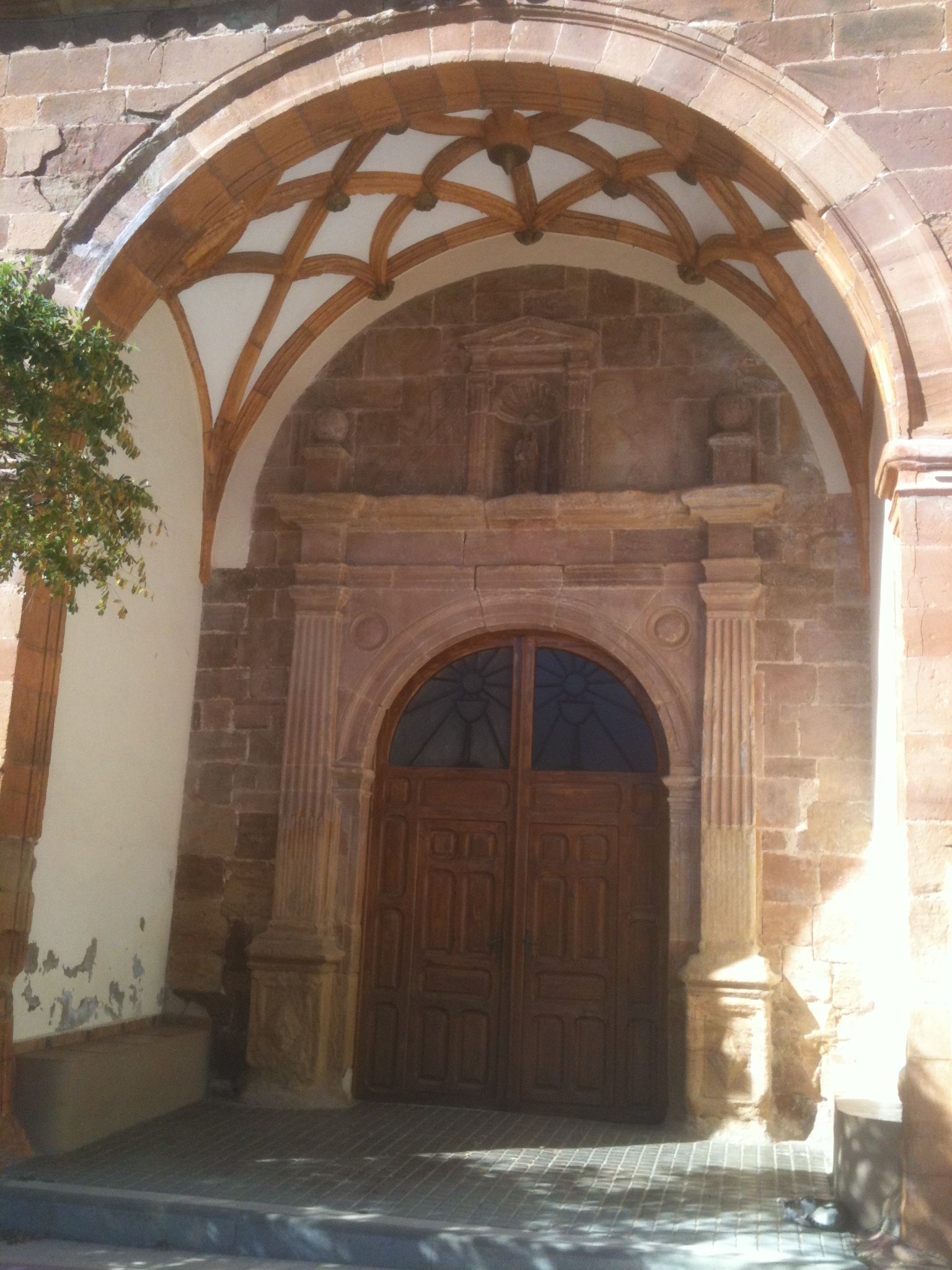 Pórtico de la iglesia de Malanquilla